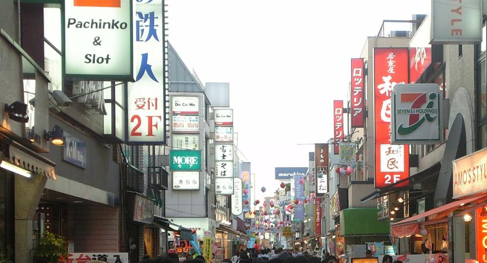 川越クレアモール